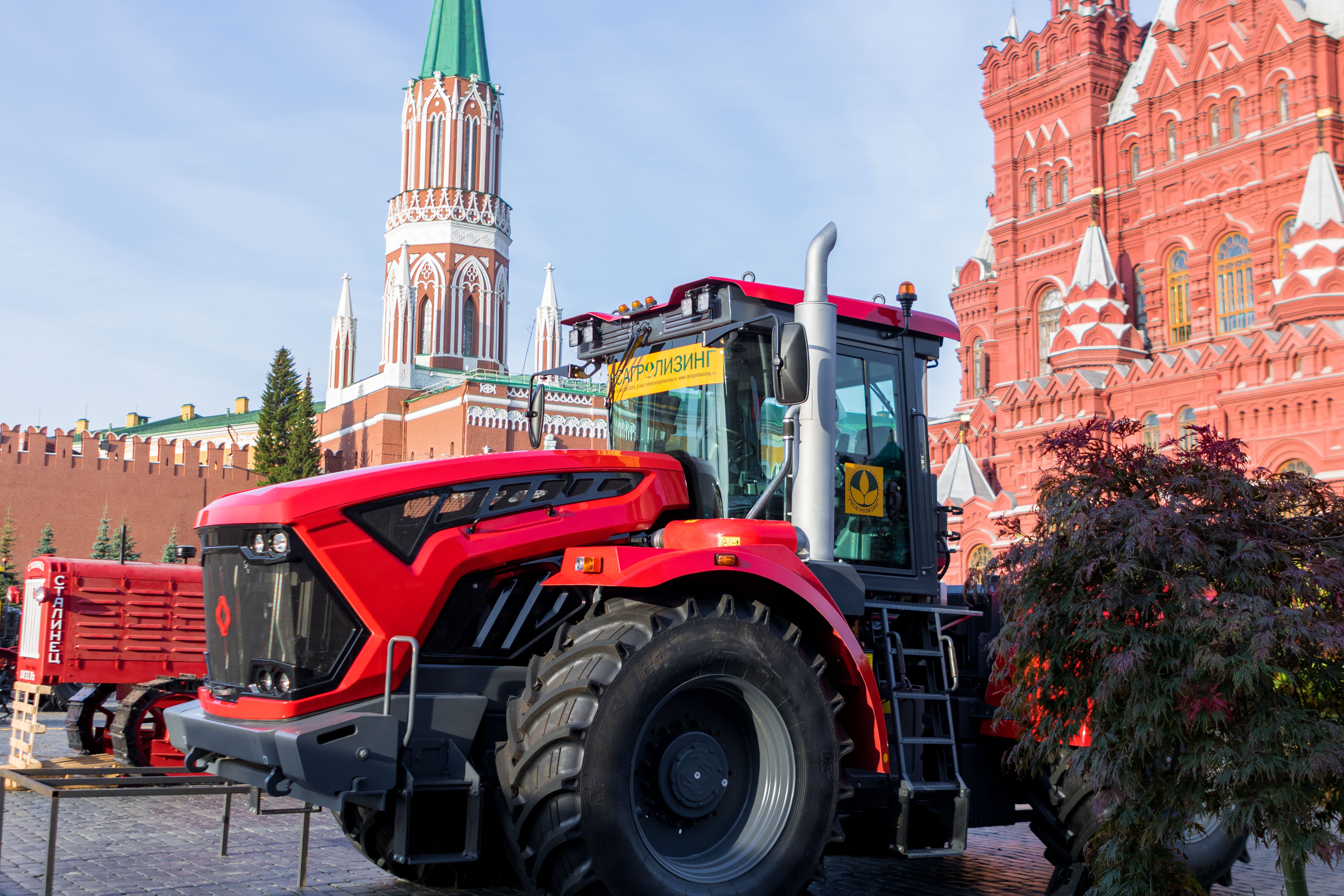 Фото брендированного Кировца